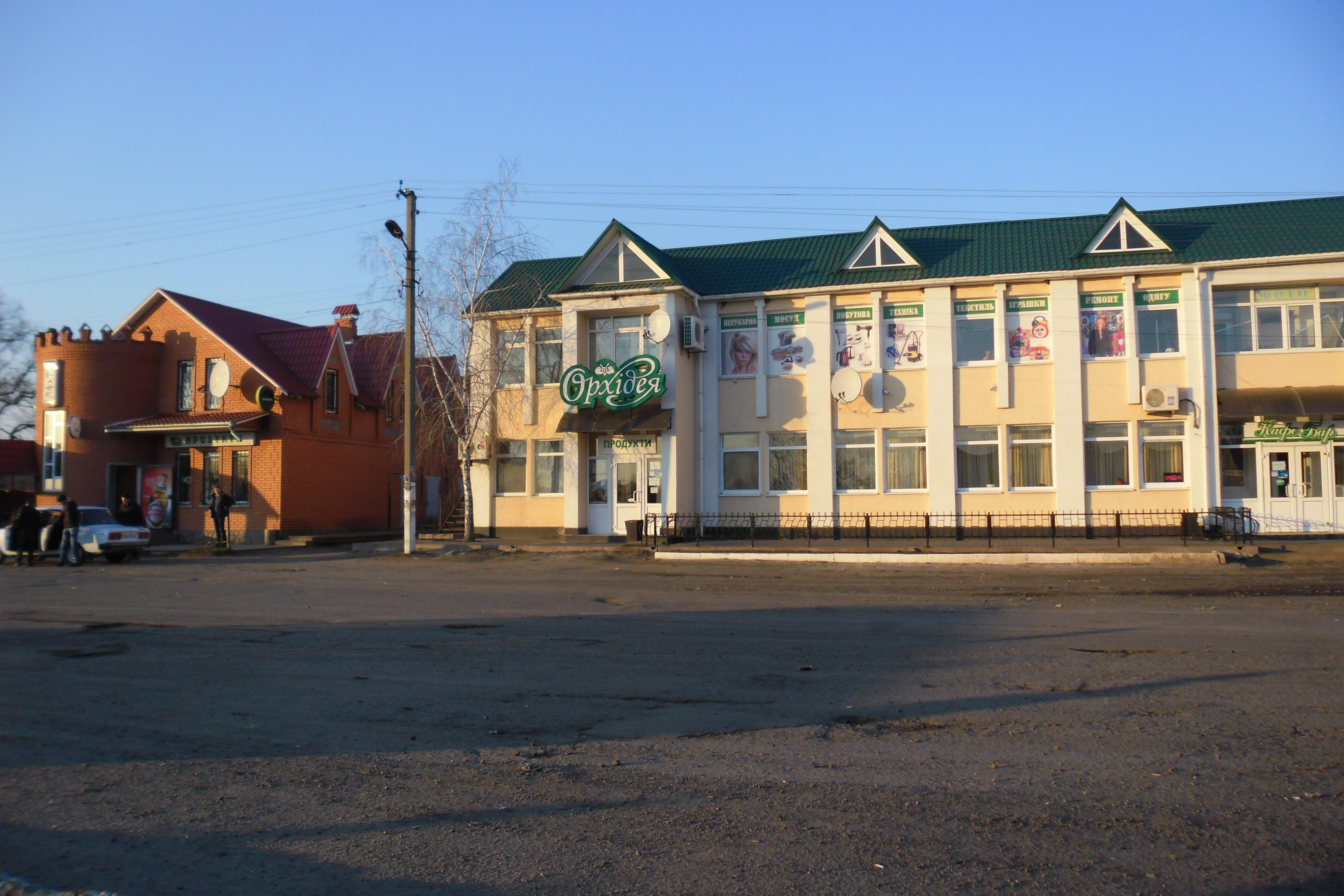 Фото